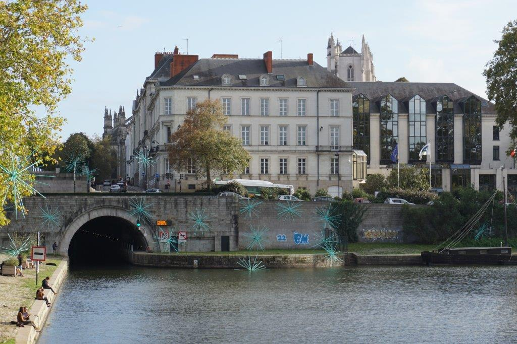 Tunnel du canal Saint Félix à Nantes (France), entrée située côté nord.